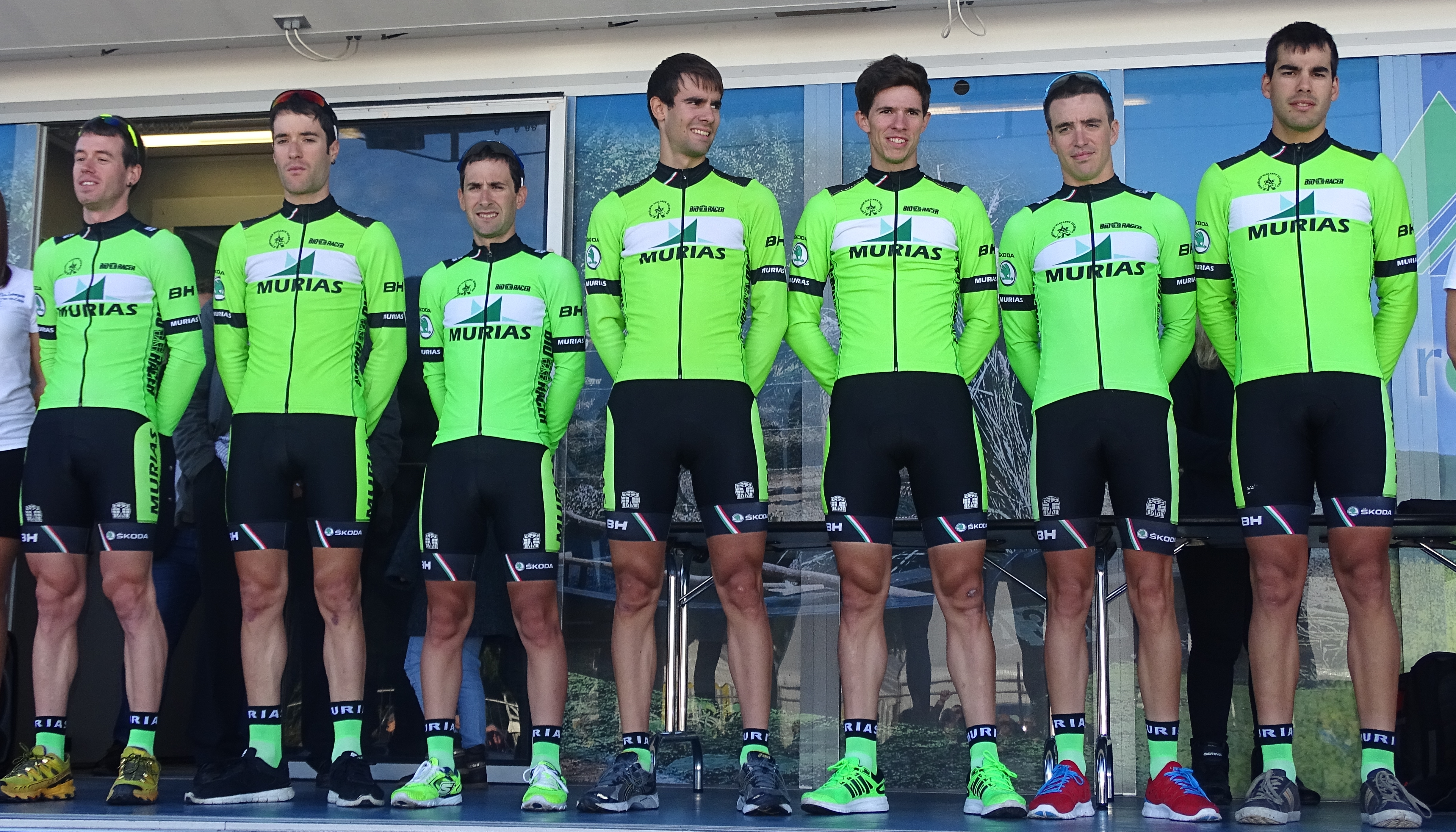 Reportage réalisé le dimanche 20 septembre à l'occasion du départ et de l'arrivée du Grand Prix d'Isbergues 2015 à Isbergues, Nord-Pas-de-Calais, France.